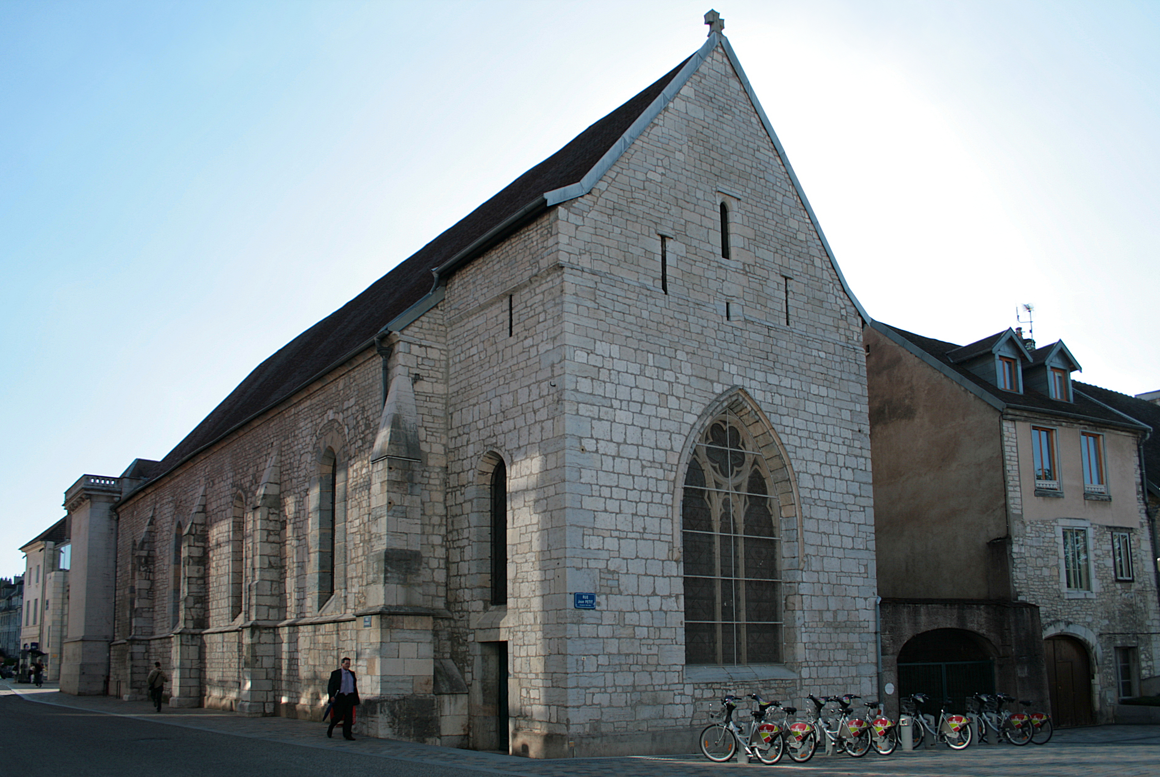 Besançon (Doubs - France), Rue claude Goudimel - L'ancien hospice du Saint-Esprit, actuellement temple du Saint-Esprit (XV-XIXème siècle).